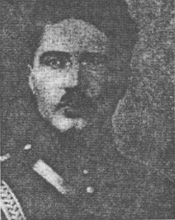 Sepahbod Amānullāh Jahānbāni (Persian: سپهبد امانﷲ جهانبانى)